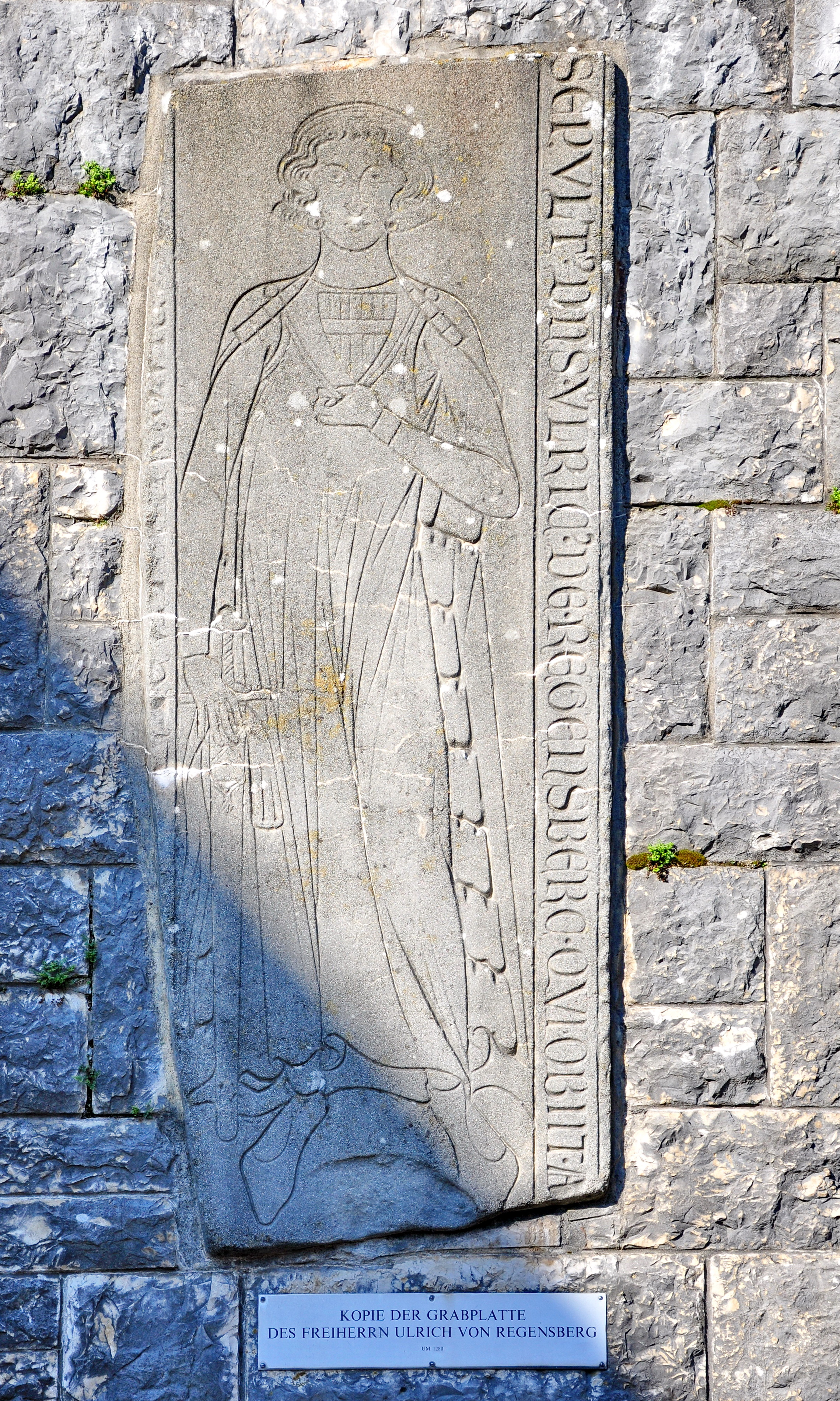 Replik des Grabsteins von Ulrich von Regensberg in Regensberg (Switzerland)